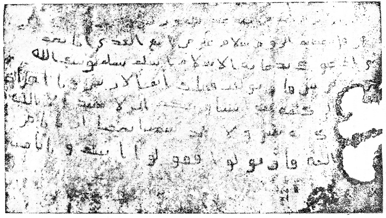 رسالة نبي الله محمد صلى الله عليه وسلم الى هرقل